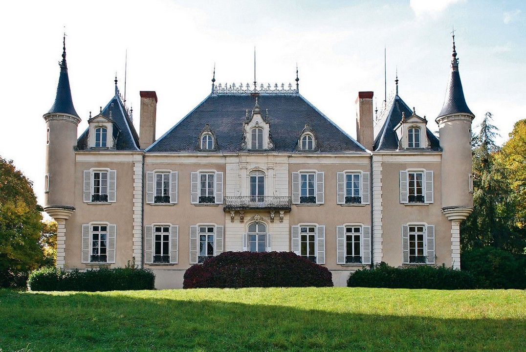 Château de Montelu "La maison des contes"